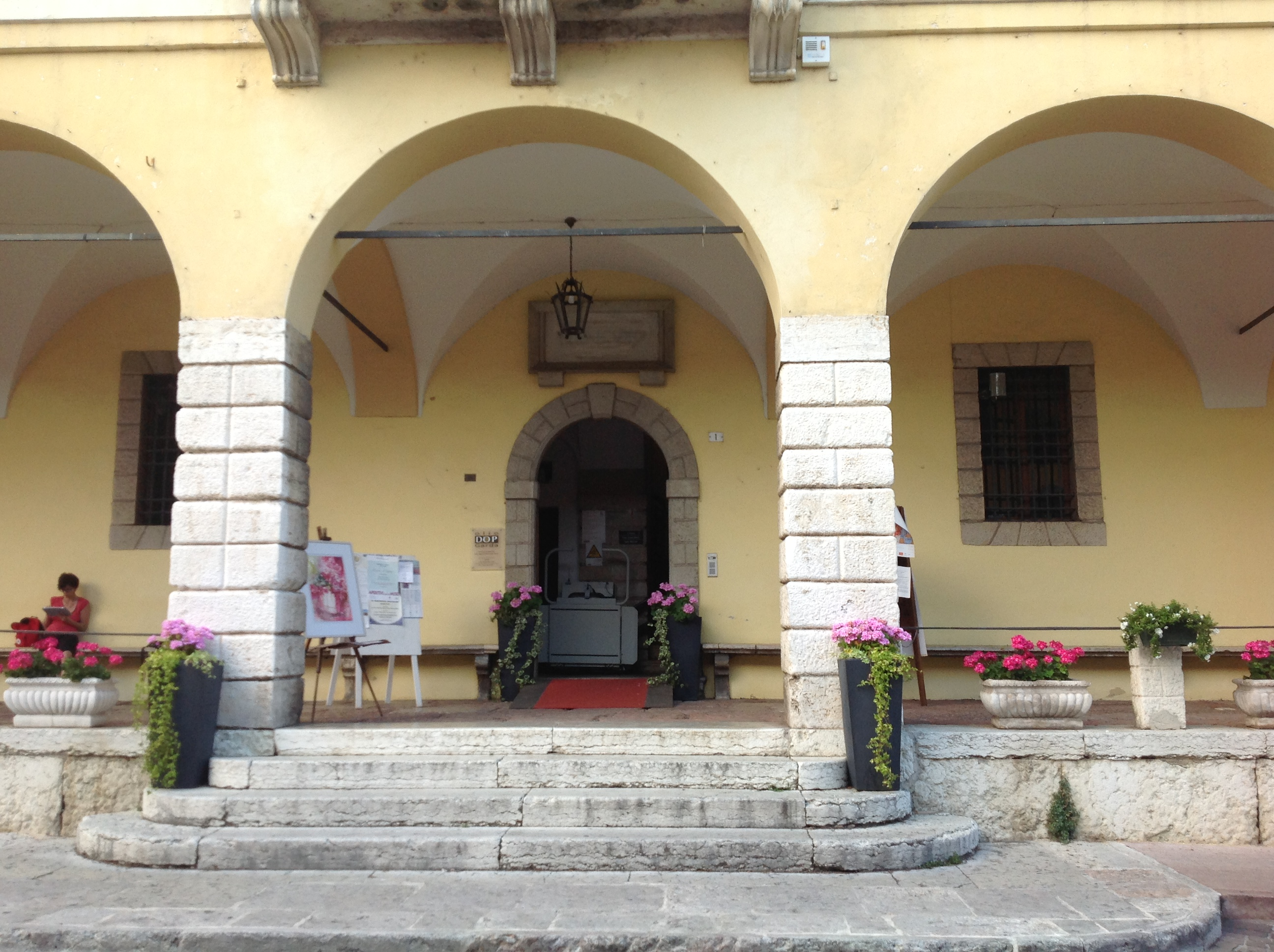 Fotografia raffigurante l'ex-Monte di Pietà, edificio sito nella piazza di San Felice del Benaco.